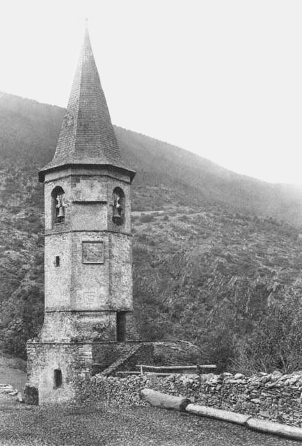 Imatge